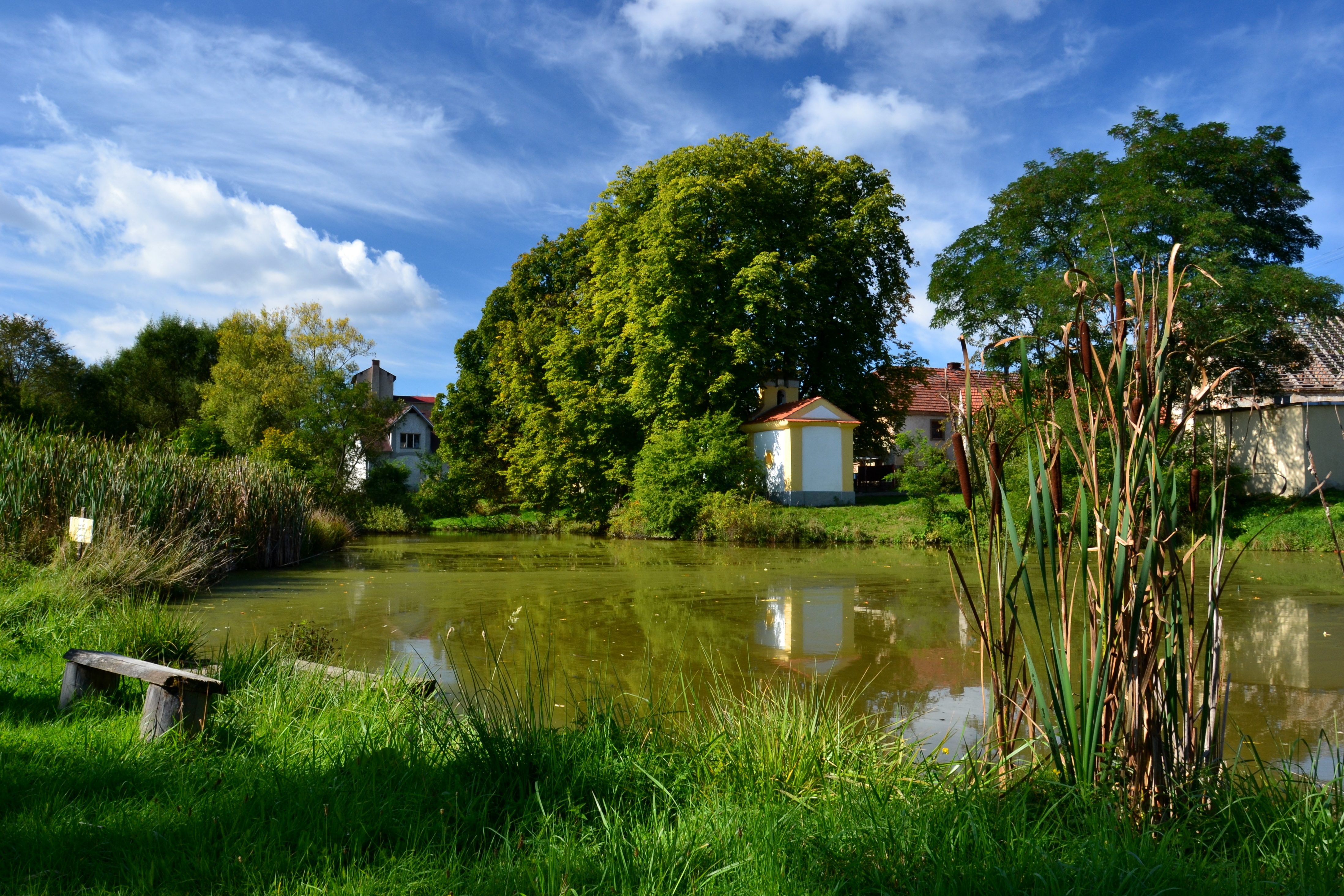 Rybník na návsi